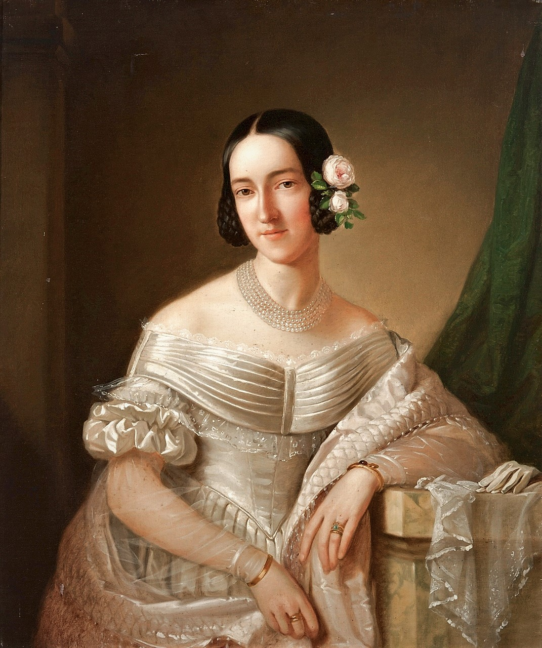 Ritratto di Hermine di Austria